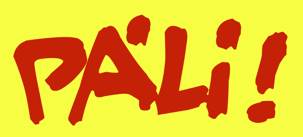 Logo preventivního programu o popáleninách